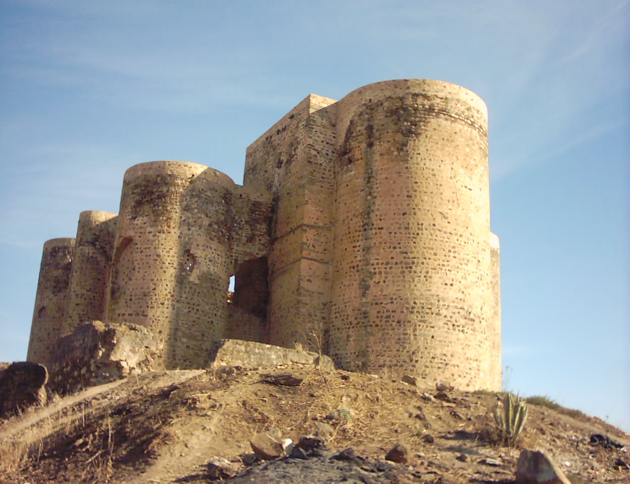 Castillo de Villalba de los Barros (Badajoz)